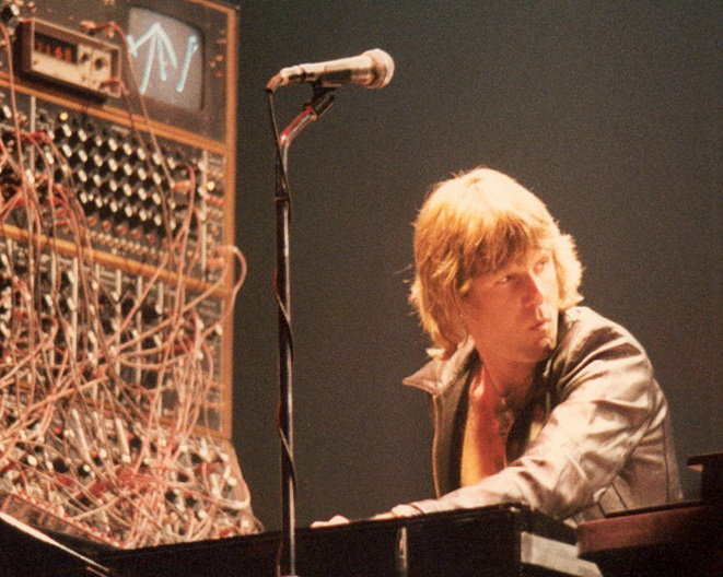 Keith Emerson, en los '70, junto al Moog modular.